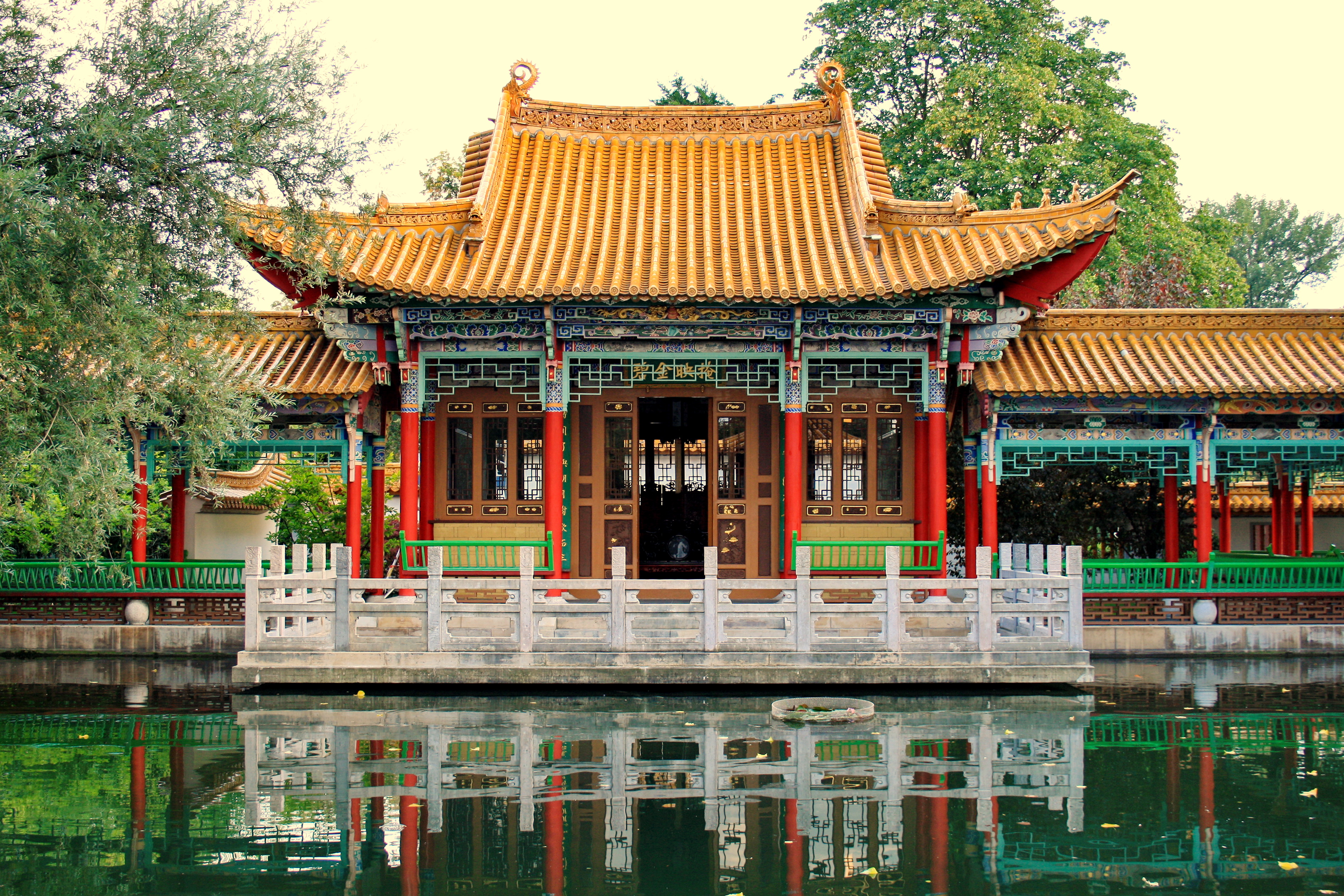 Water palais in Chinagarten Zürich (Switzerland)